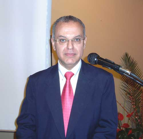 Foto del Ministro de Hacienda